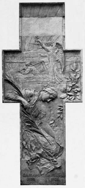 Vautier-Denkmal, Grabrelief in Form eines Kreuz, "Die trauernde Malerei und der Genius der Unsterblichkeit, den Tod vertreibend", von Bildhauer Karl Janssen, errichtet in 1898 auf dem Nordfriedhof Düsseldorf; das Grabmal befindet sich seit 2004 auf dem Friedhof Düsseldorf-Unterrath, die Inschrift Benjamin Vautier ausgemerzt – dort nun Familie Schulten